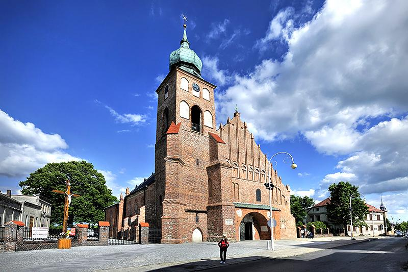 Fara sieradzka